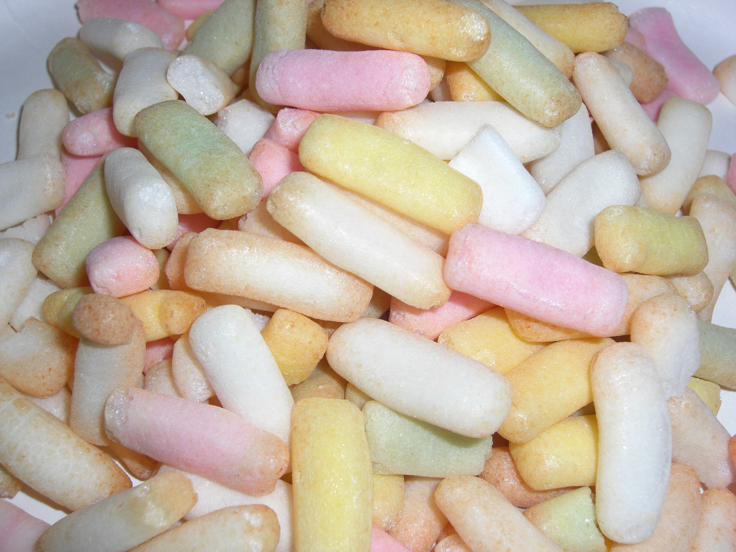 ひなあられ 名古屋タイプ